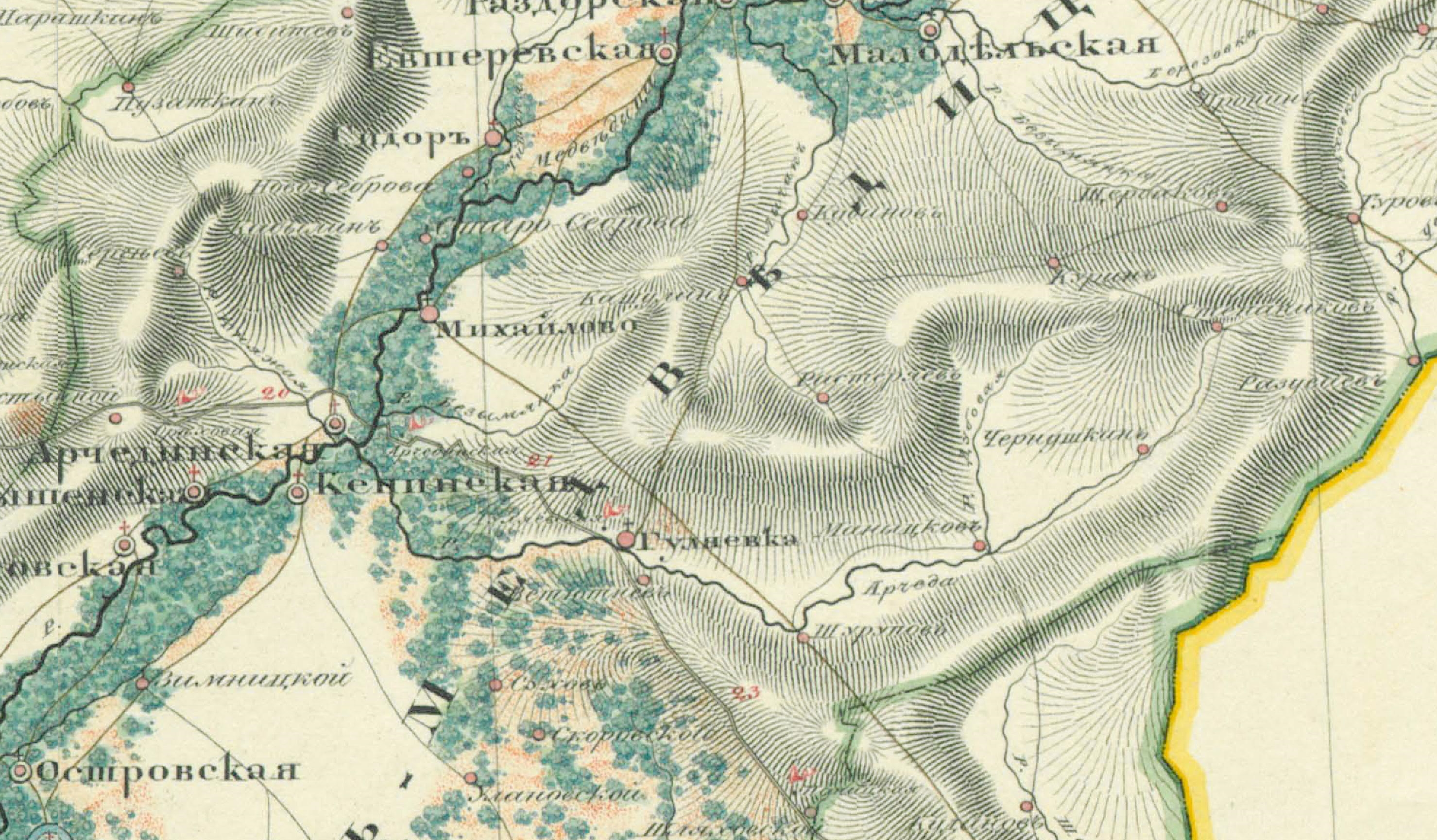 Река Арчеда на подробной карте земли Войска Донского 1833 года.